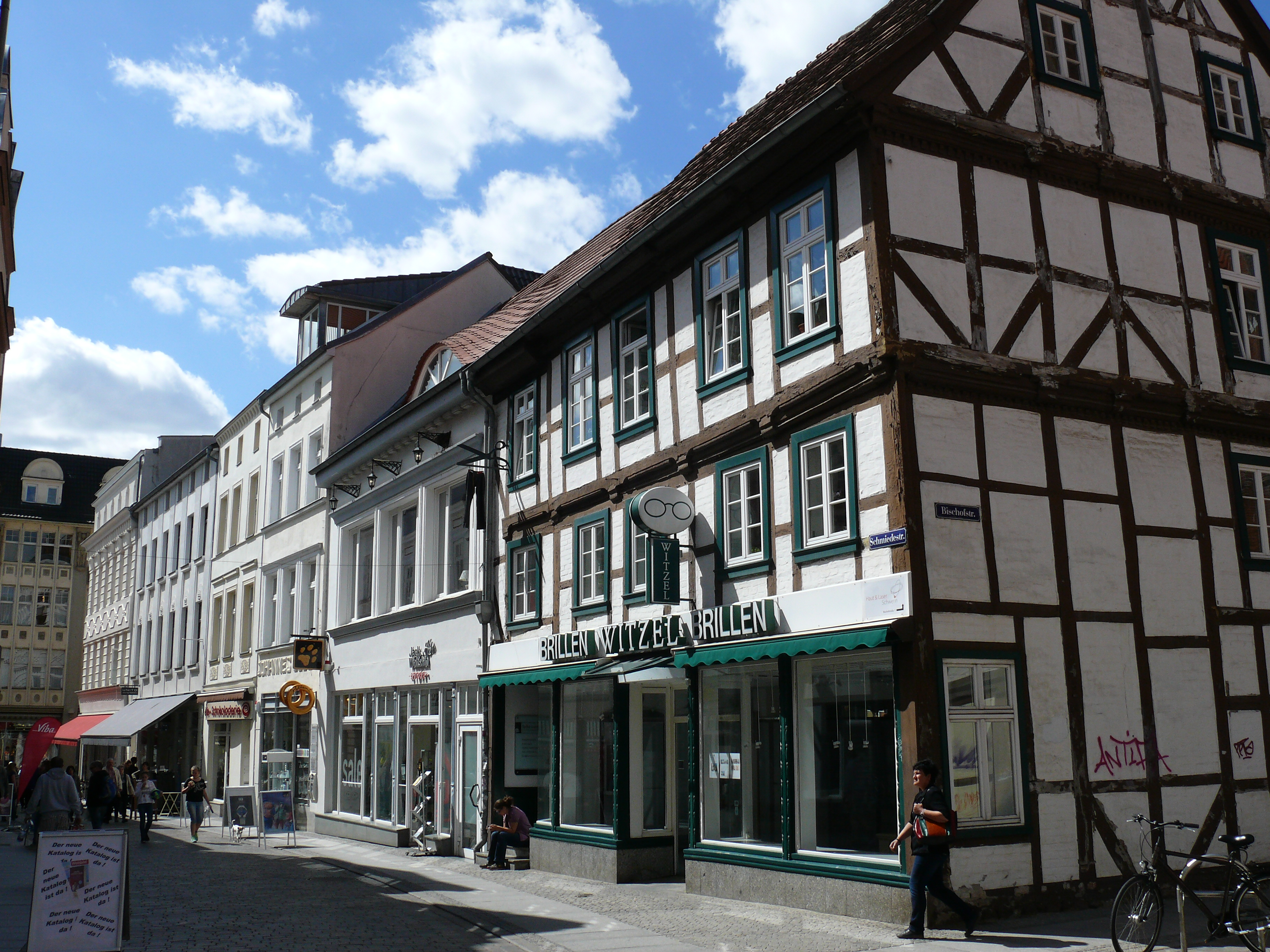 Die Gebäude "Schmiedestraße 15 (rechts) - 23" in Schwerin.